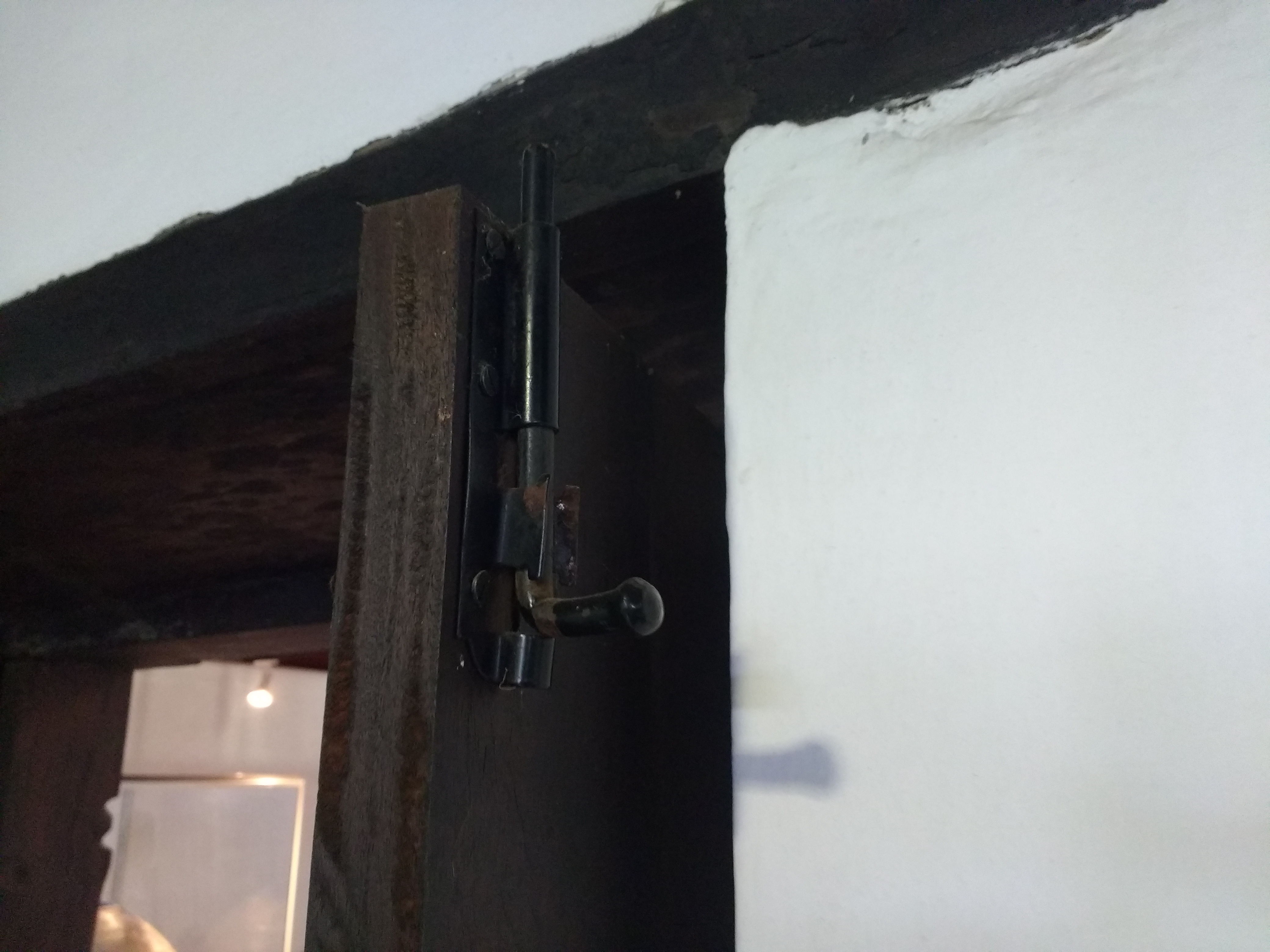 Fechadura confeccionada pelos beneditinos na oficina construída no anexo à casa original